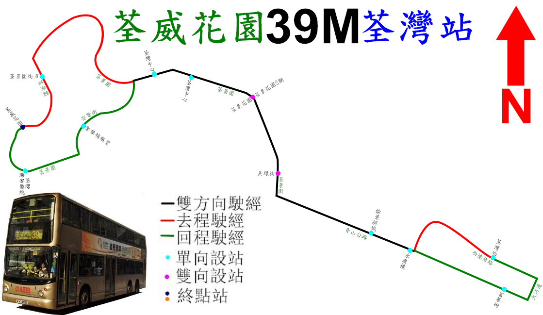 中文（香港）: 九巴39M線的走線圖